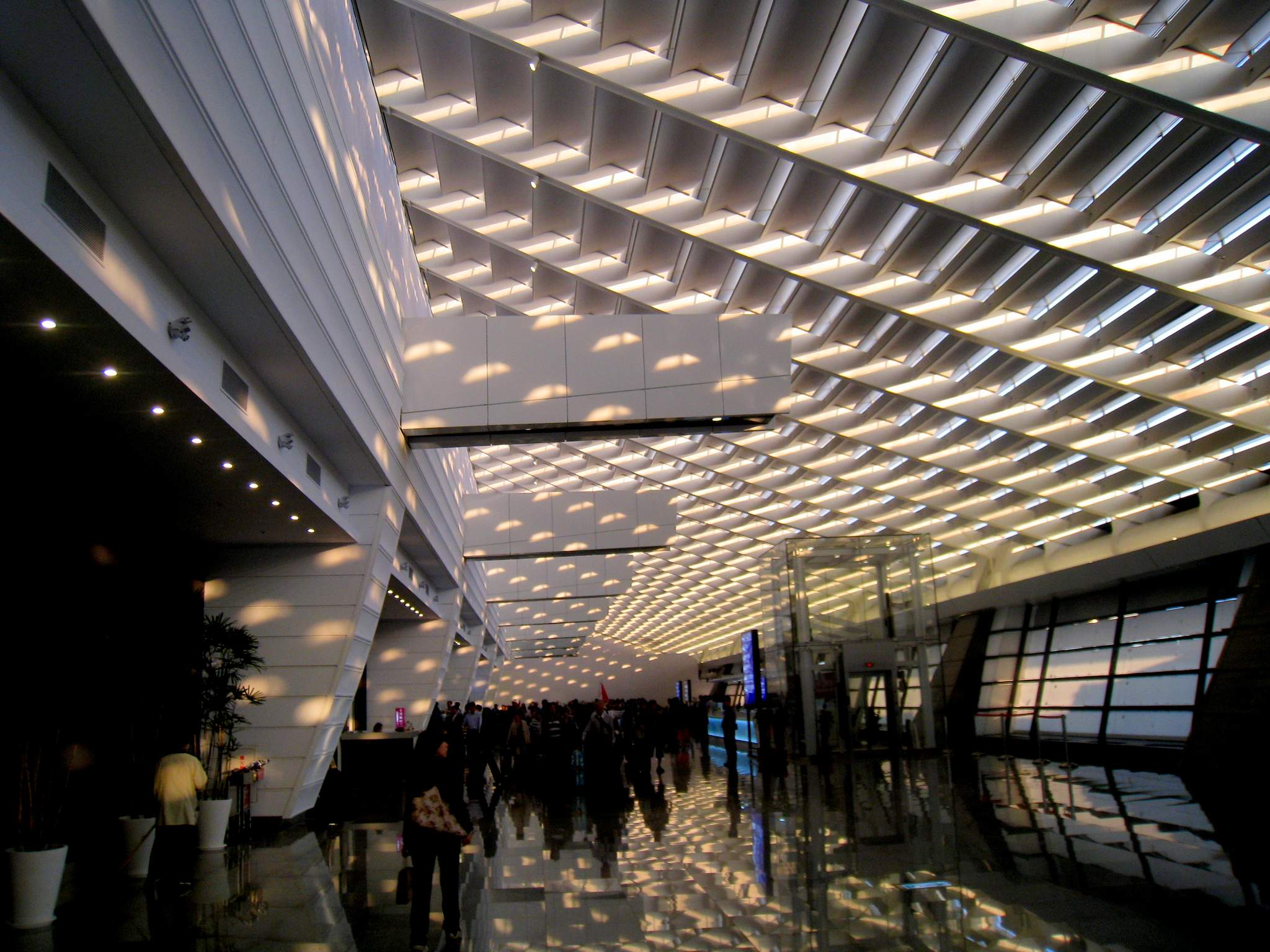 桃園機場第一航廈入境大廳改建後的新樣貌，攝於2012年5月22日